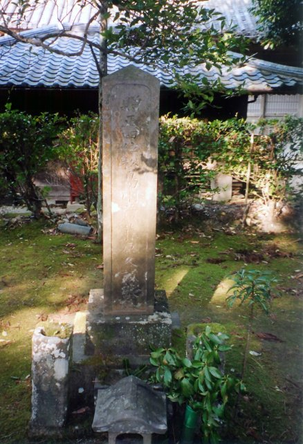 山口県萩市東光寺にある松島剛蔵の墓。